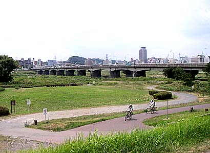 多摩川にかかる、鎌倉街道の橋梁（旧橋）。右が東京都府中市、左が多摩市。